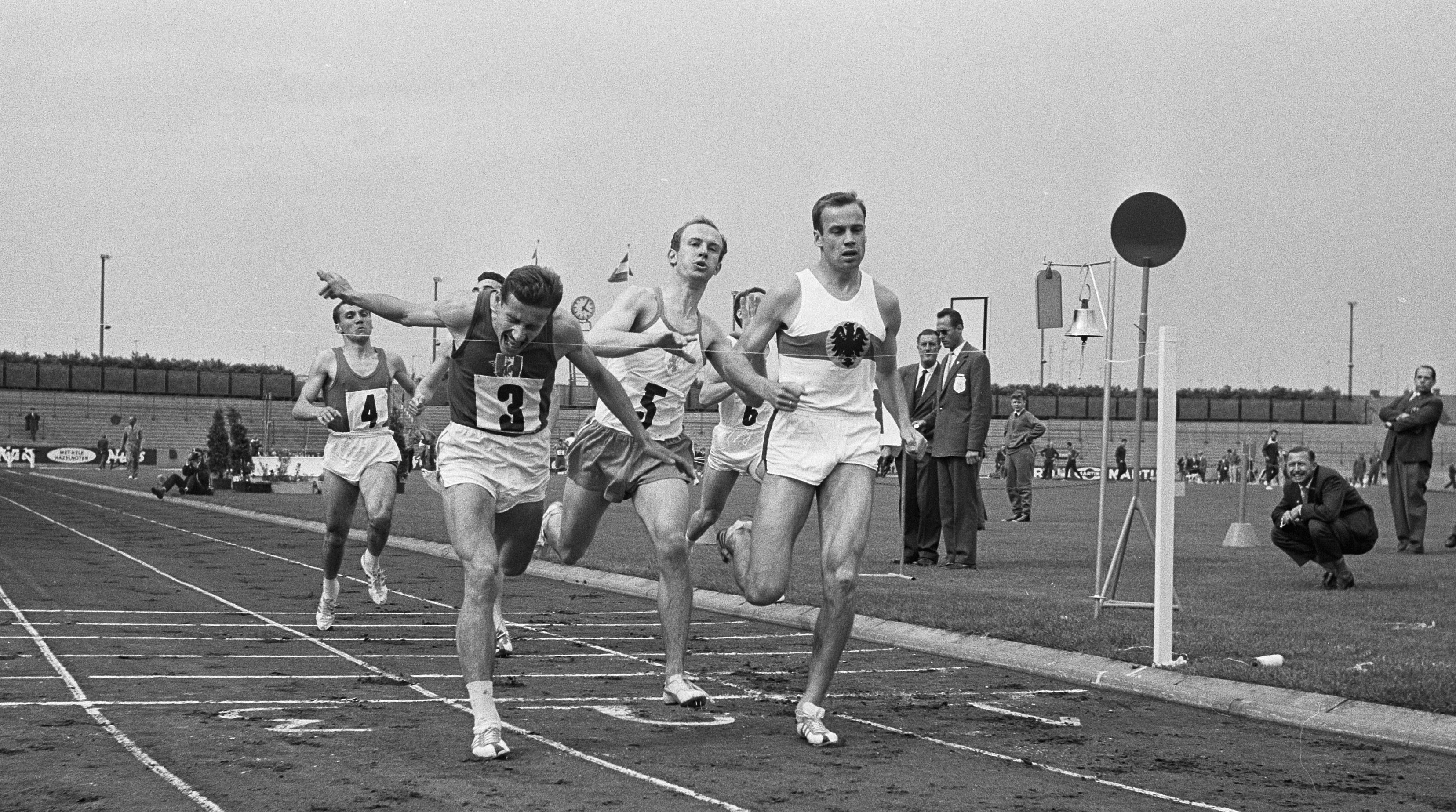 Zes Landen Atletiek in Enschede. Finish 800m M. Kinder (Duitsland), Jan van Uden en J. Lurot (Frankrijk) )